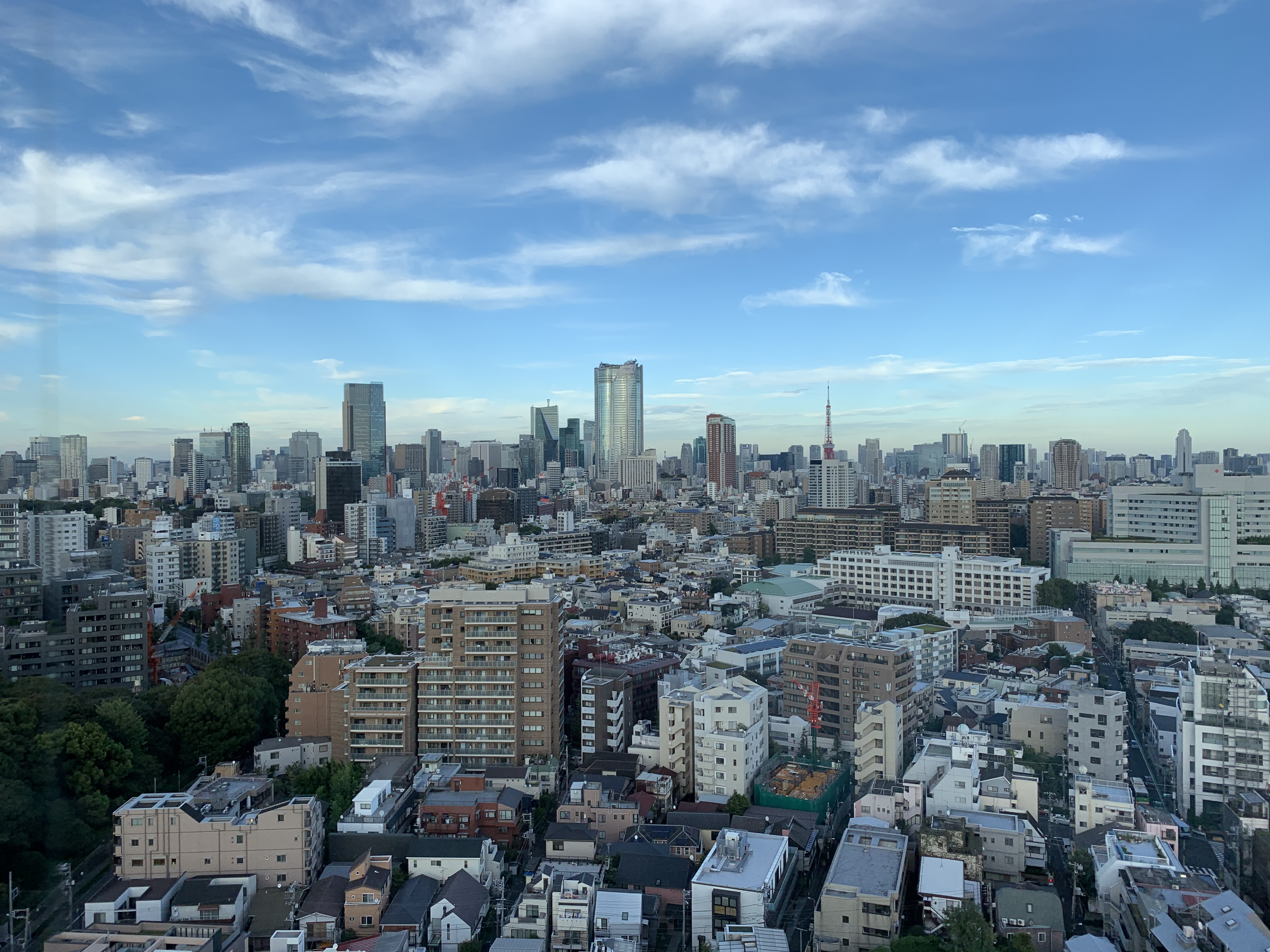 國學院大學渋谷キャンパス若木タワー18階の有栖川宮記念ホールから六本木、芝方面を望む